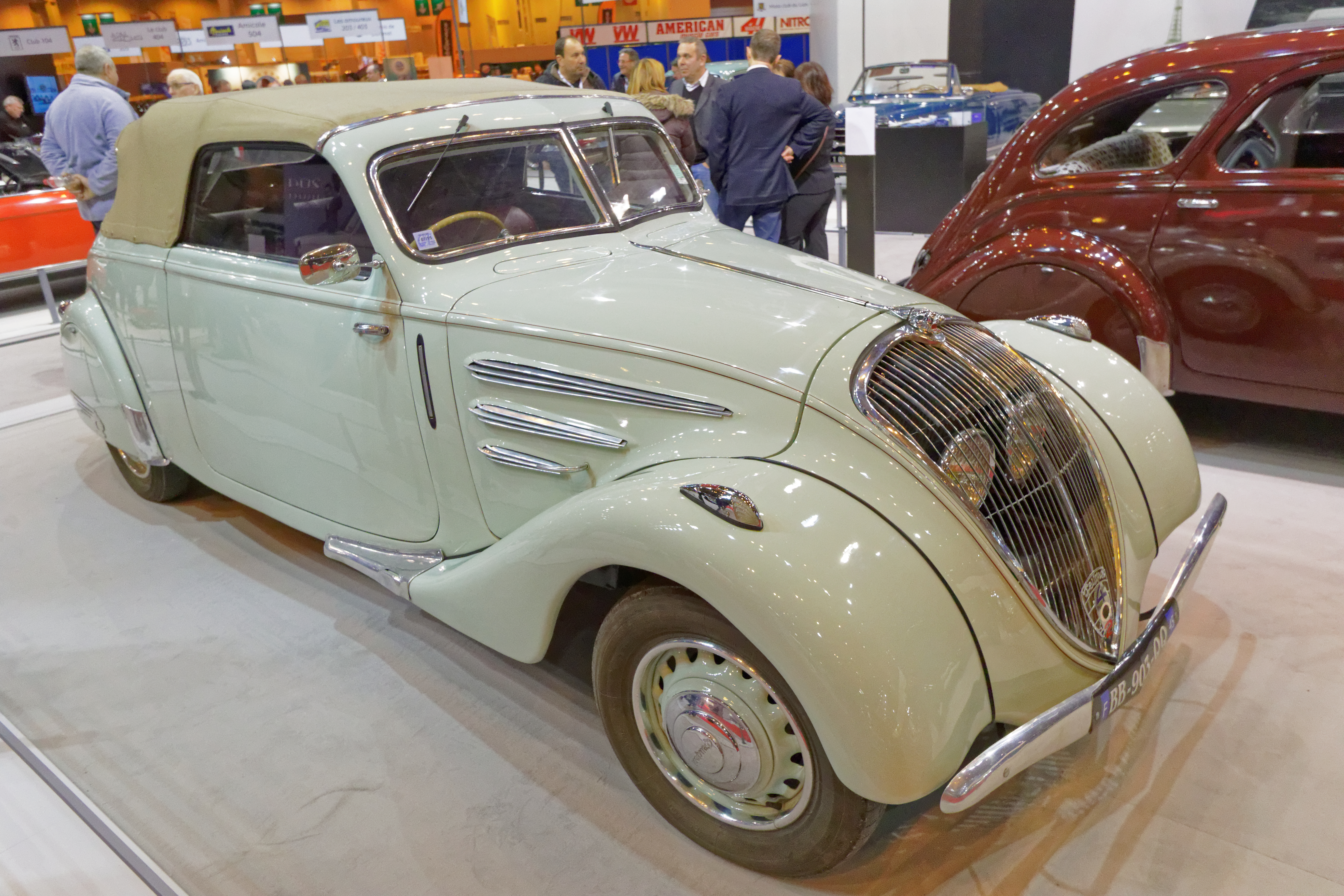 Une des voiture présentée lors du salon Rétromobile de Paris 2015